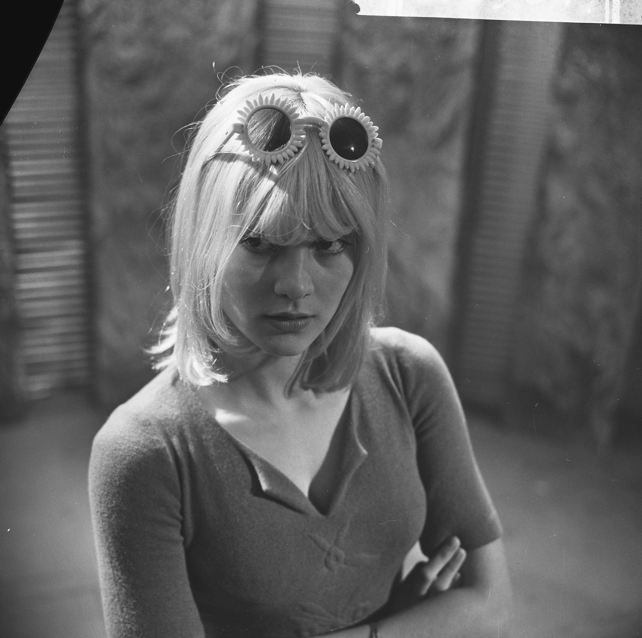 Collectie / Archief : Fotocollectie Anefo Reportage / Serie : [ onbekend ] Beschrijving : Sylvie Vartan (Frans zangeresje) getrouwd met Johny Hallyday Annotatie : AVRO Televisie; opnamen programma Tienertheater, uitgezonden op 26 maart 1966 Datum : 11 maart 1966 Trefwoorden : portretten, zangers, zonnebrillen Persoonsnaam : Vartan, Sylvie Fotograaf : Koch, Eric / Anefo Auteursrechthebbende : Nationaal Archief Materiaalsoort : Negatief (zwart/wit) Nummer archiefinventaris : bekijk toegang 2.24.01.03 Bestanddeelnummer : 918-9047